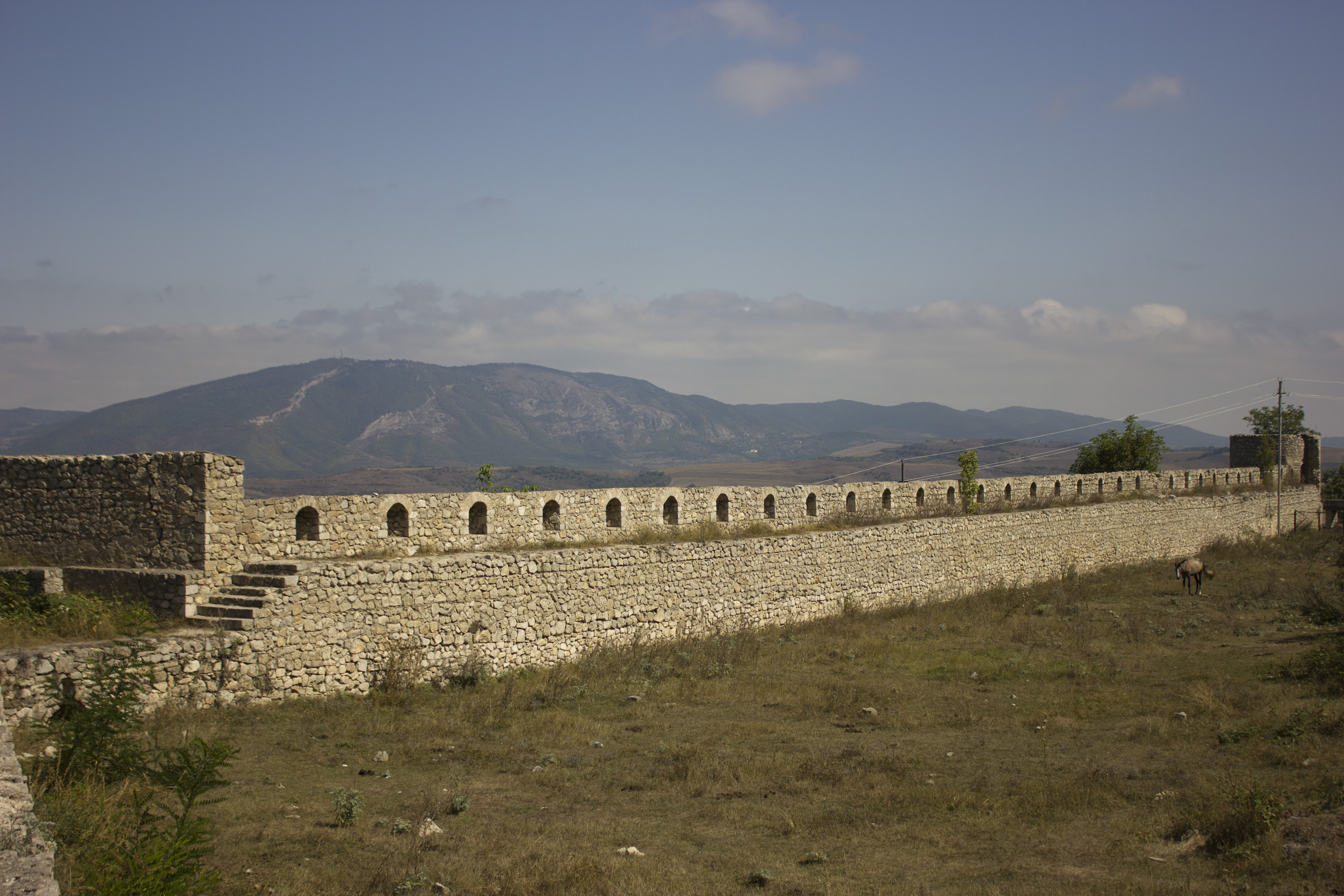 Şuşa şəhərində qala divarları.